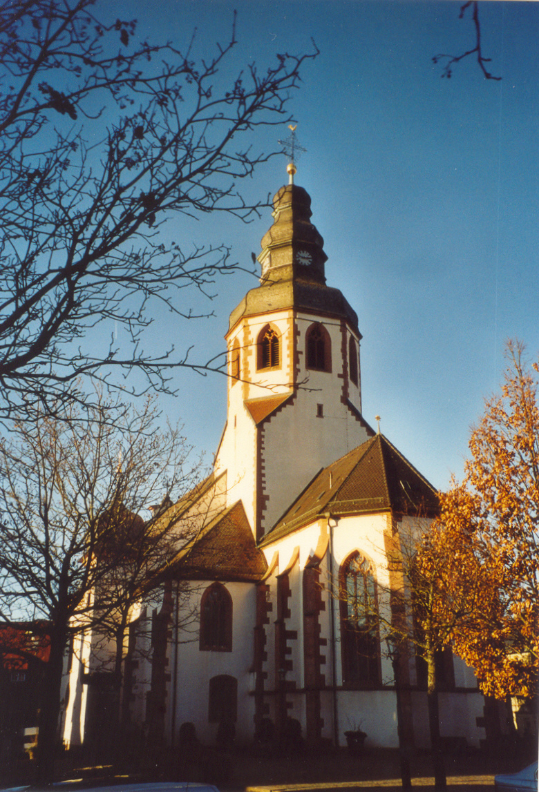 Ettlingen : Sankt Martinskirche. Die zu sehende Rückseite zeigt Gotik (Chor), Romanik (Teile des Turmes) und Barock (Turmspitze) - reizvoller Stilmix.